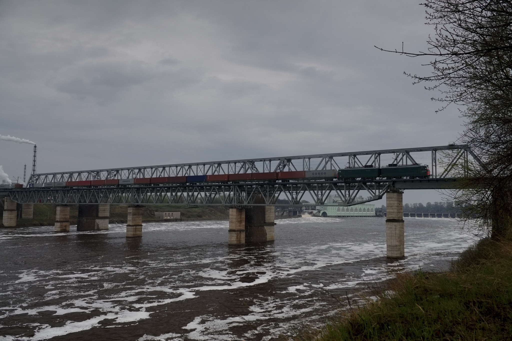 Река Волхов, трубы алюминиевого завода, ГЭС и железнодорожный мост, г. Волхов. см. фото 502713 в альбоме автора